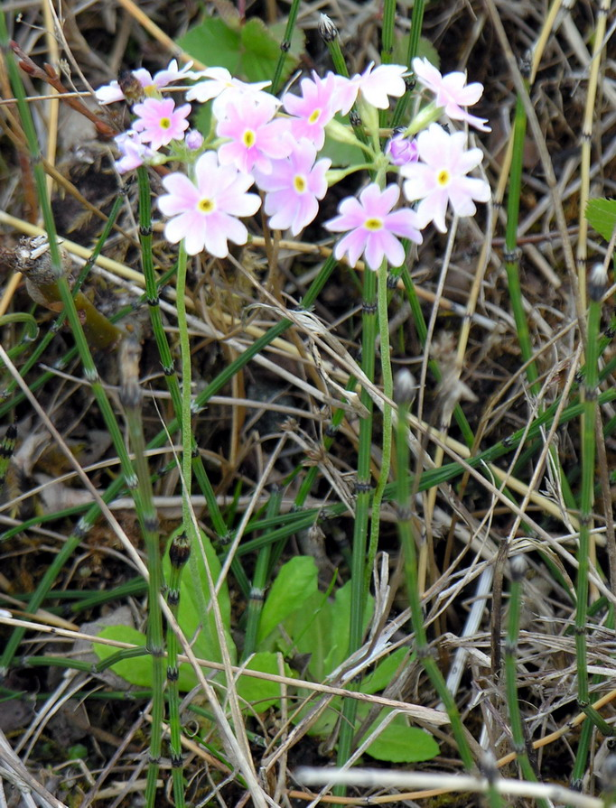 Raktažolė pelenėlė (Primula farinosa) Šeima. Raktažoliniai (Primulaceae) Foto: Algirdas, 2006 m. gegužės 30 d.